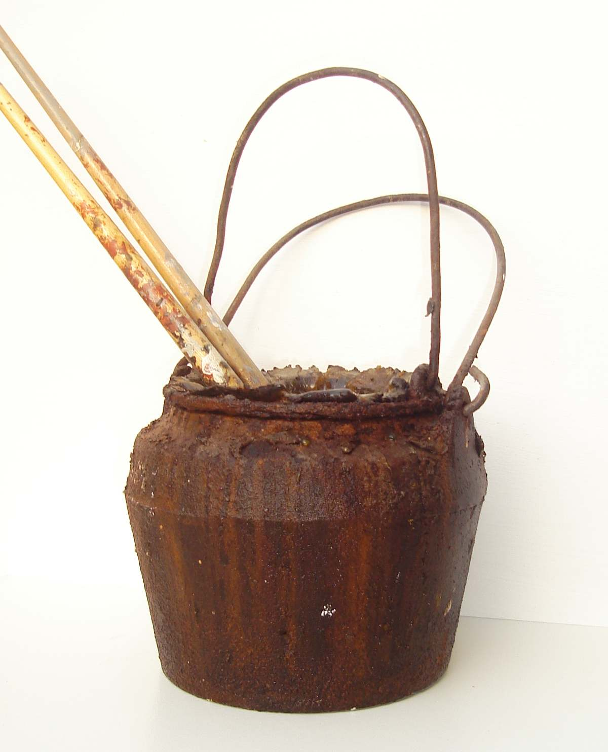 pentola per sciogliere la colla forte (colla cervione colla in perle colla a caldo)